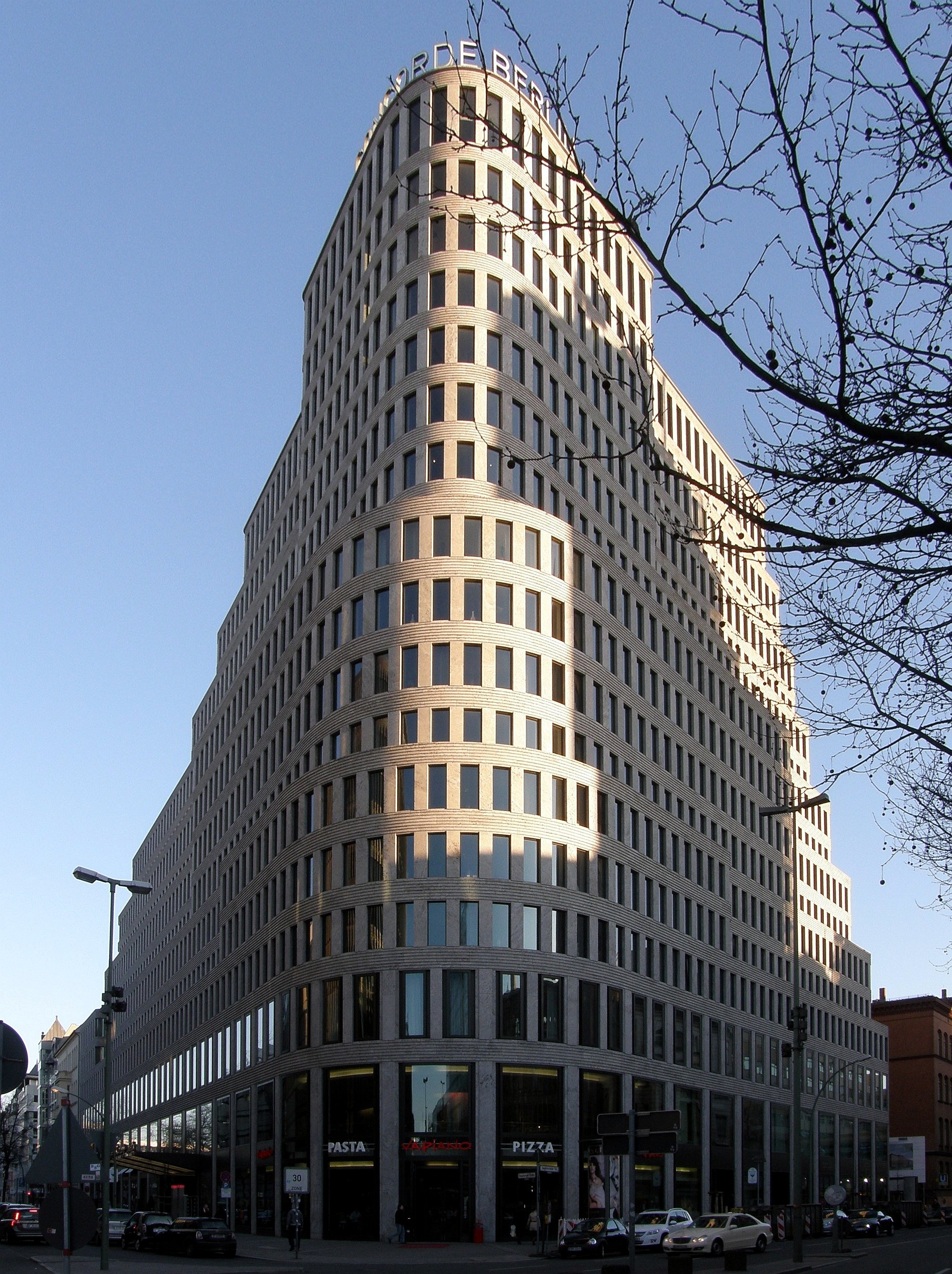 Hotel Concorde, Joachimstaler Ecke Augsburger Straße in Berlin-Charlottenburg. Architekt: Jan Kleihues, Büro Kleihues + Kleihues.